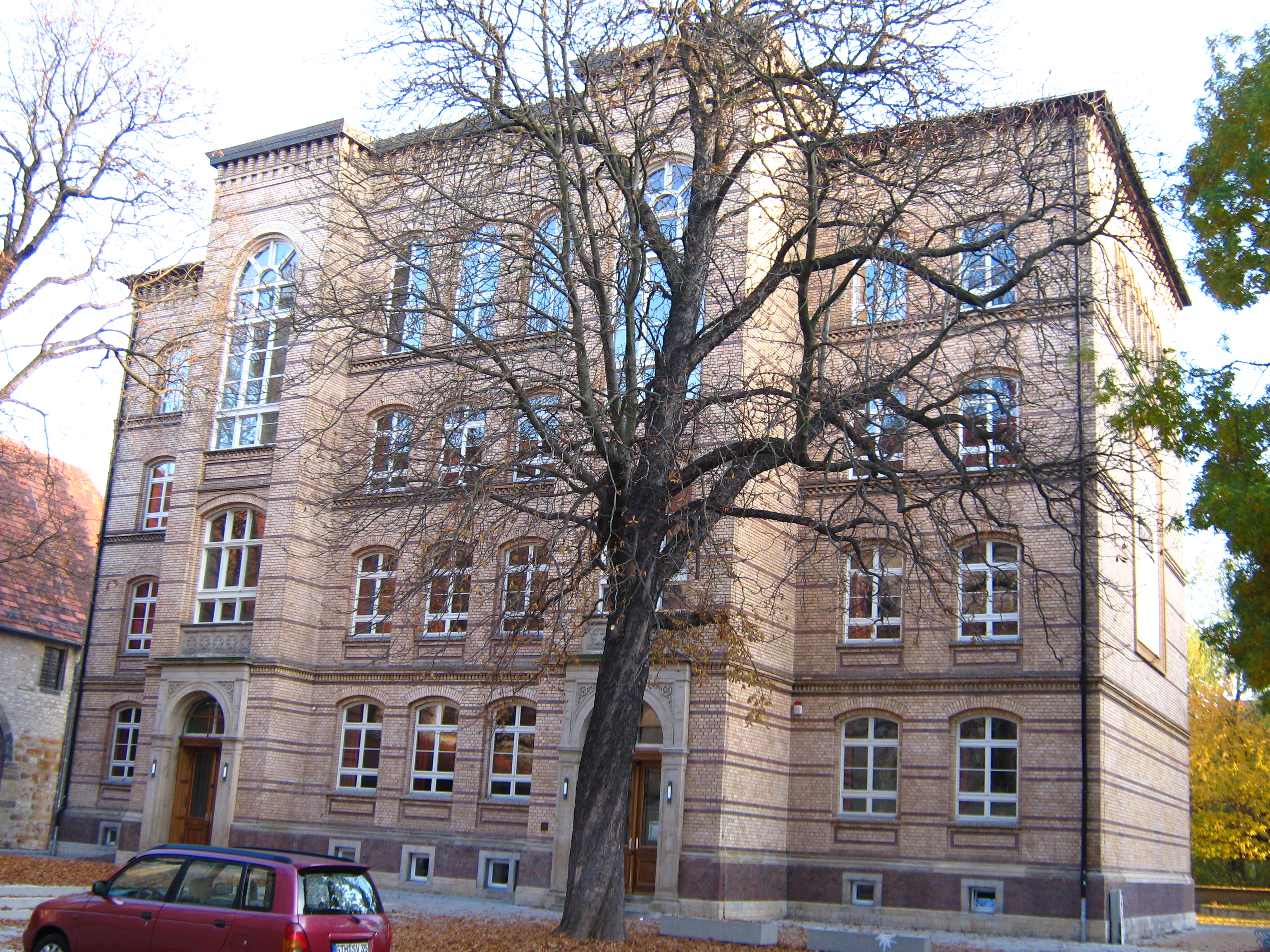 Evangelisches Ratsgymnasium Erfurt (Deutschland), humanistisch, Gebäude "Casinoschule".